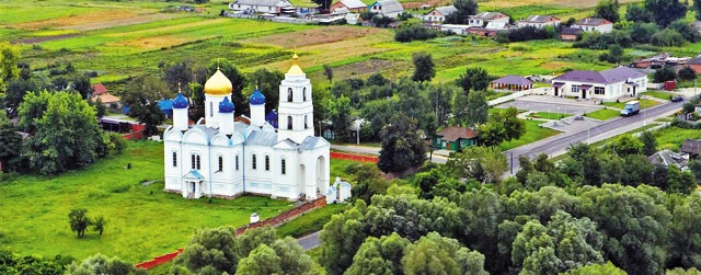 Уланок. Церковь Рождества Христова